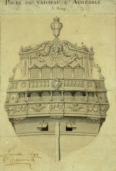 Décor de poupe du vaisseau l'Agréable (56 canons) dessiné par Jean Bérain. Vaisseau lancé en 1671 et refondu en 1697.